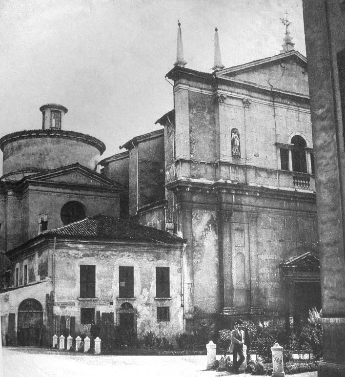 La chiesa di San Domenico (Brescia) in una foto del 1883